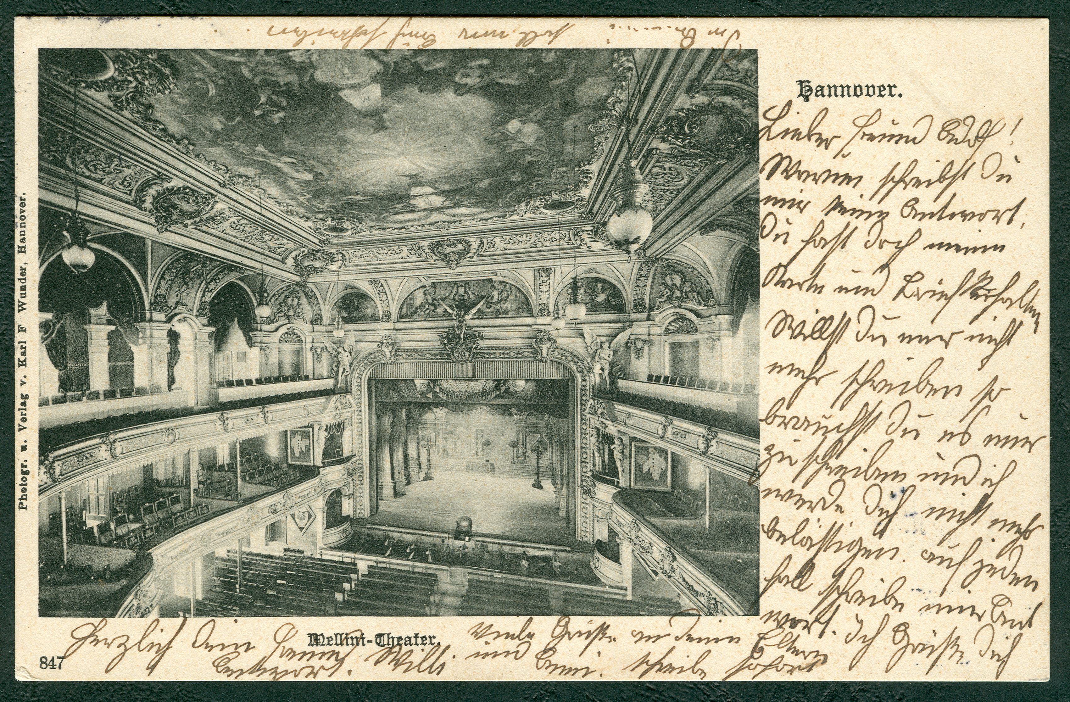 Ansichtskarte von Karl Friedrich Wunder. Handschriftlicher Mitteilungstext: "Lieber Freund Adolf! Warum schreibst Du mir keine Antwort. Du hast doch meine Karte und Brief erhalten. Willst Du mir nicht mehr schreiben so brauchst Du es nur zu schreiben und ich werde Dich nicht mehr belästigen. auf jeden Fall schreibe mir Antwort. Ich grüße Dich herzlich Dein Freund Willi . viele Grüße an Deine Eltern und . schreibe sofort Antwort."